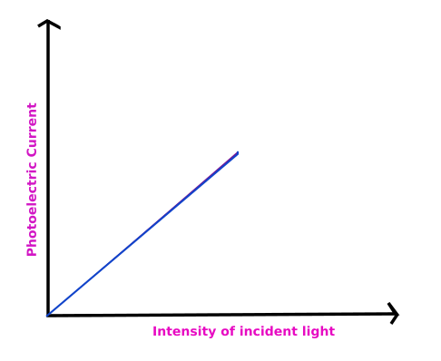 ഫോട്ടോ ഇലക്ട്രിക്ക് എമിഷനും പ്രകാശതീവ്രതയും തമ്മിലുള്ള ഗ്രാഫ്